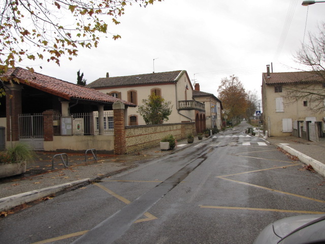 Saint-Quirc